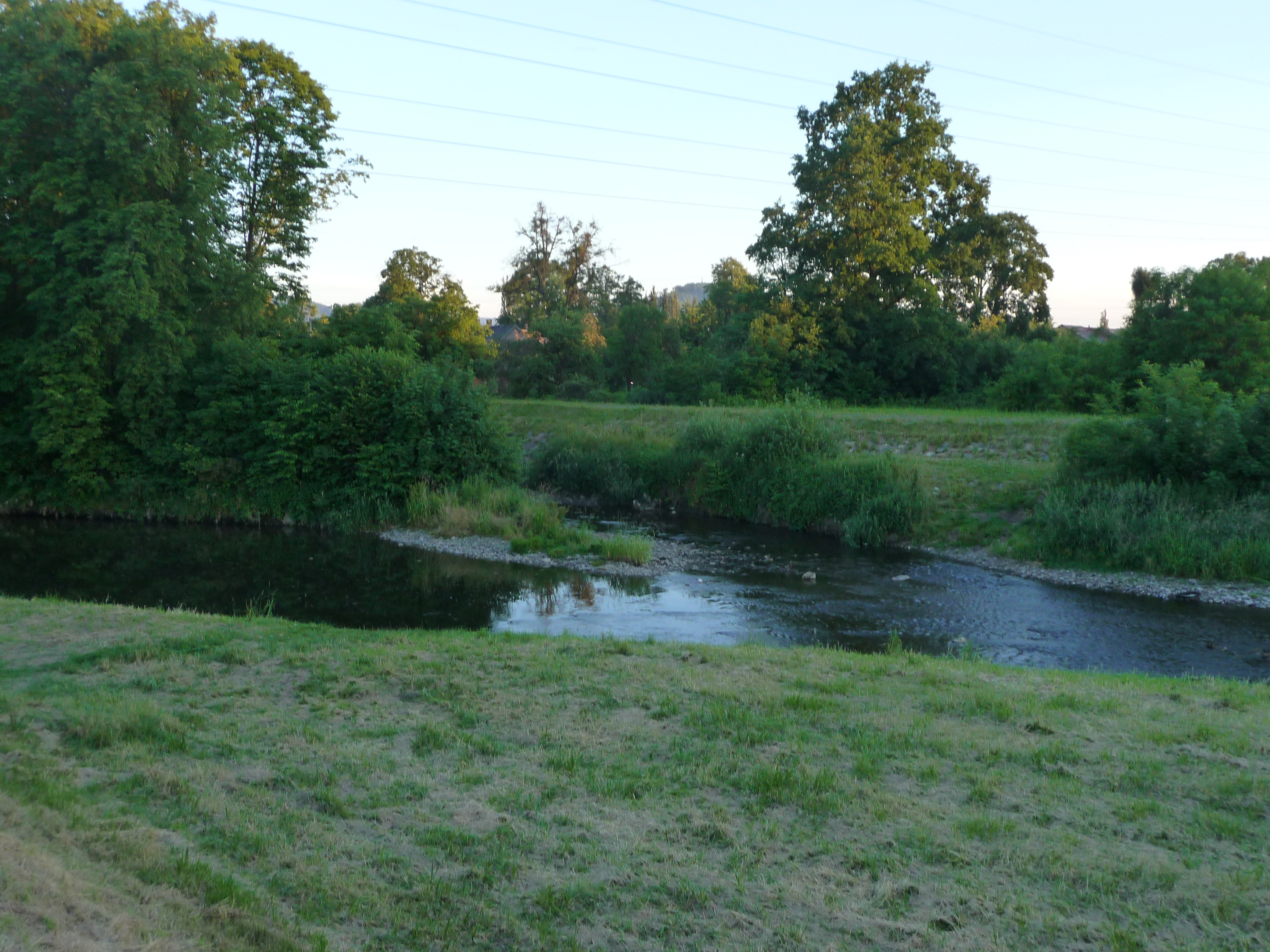 Soutok Kopřivničky s Lubinou.